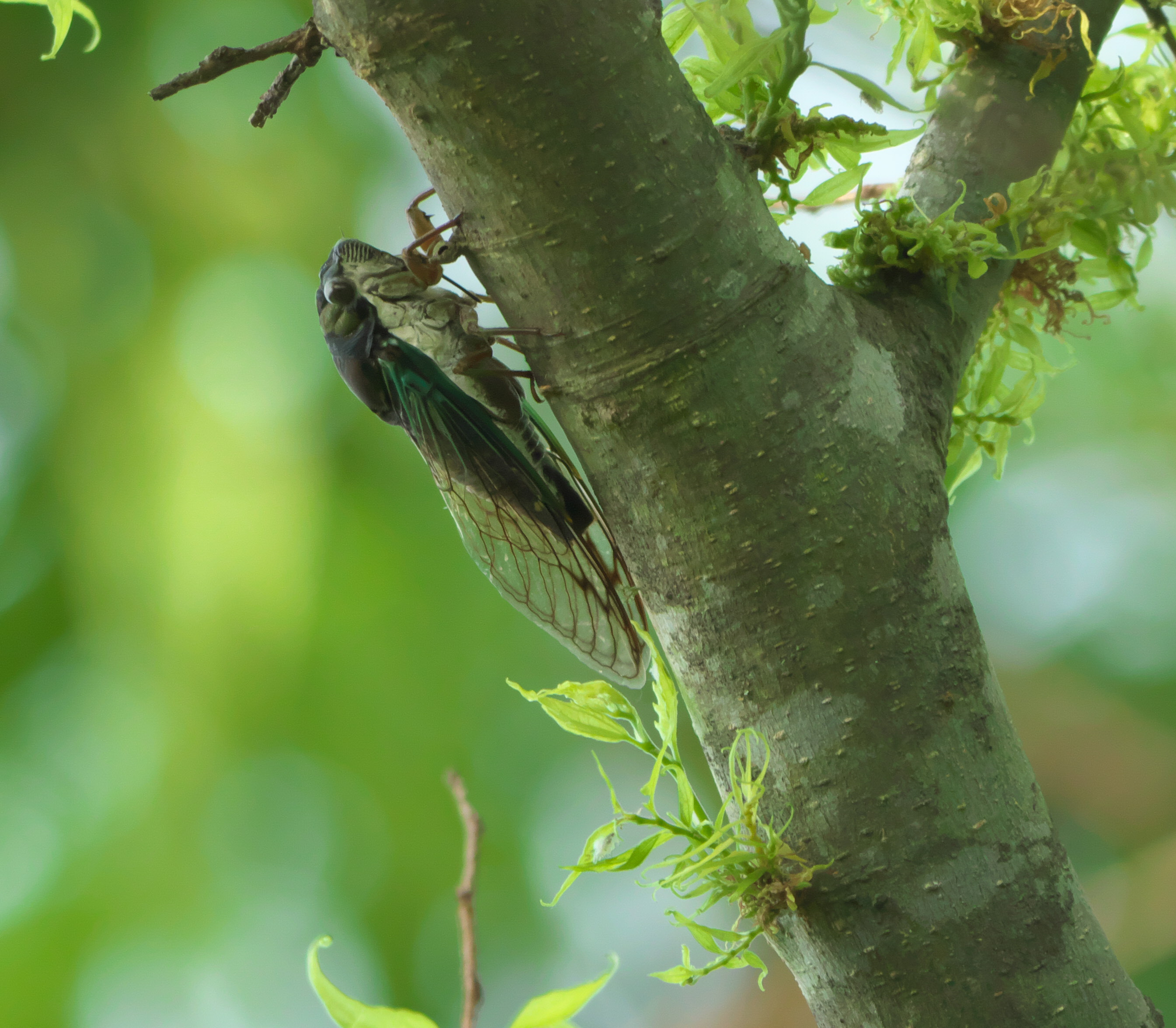 Neotibicen lyricen virescens, coastal lyric cicada, ID Confidence: 98